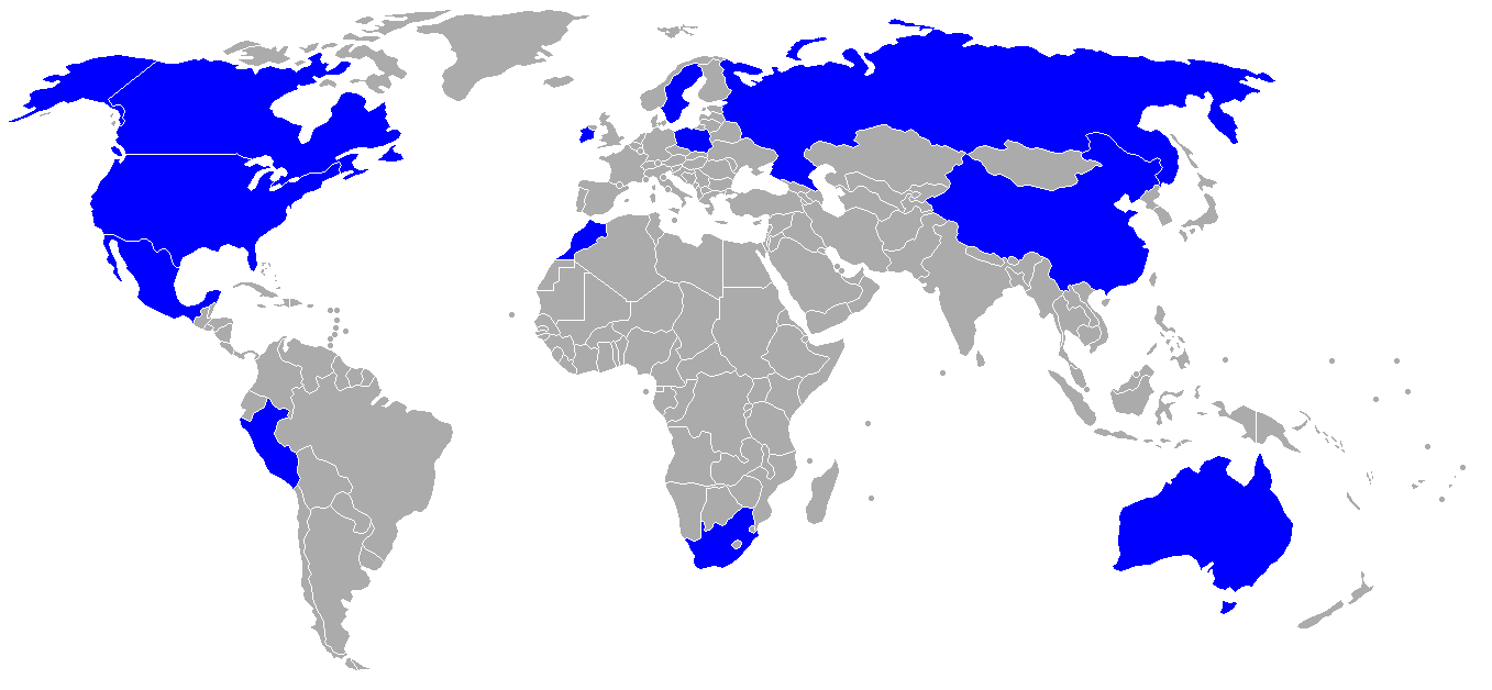 Karte mit den wichtigsten Bleiförderländern